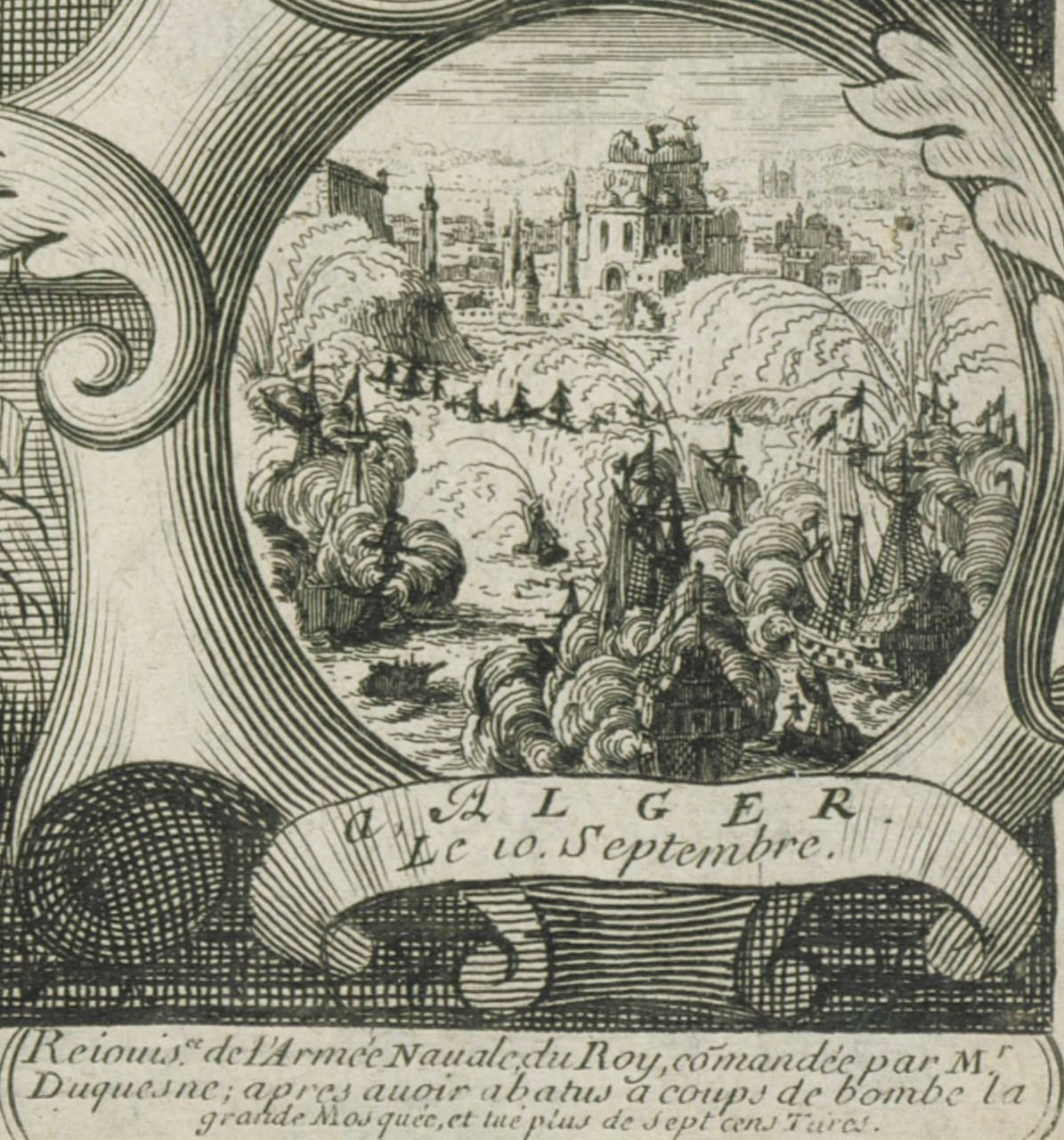 Détail d'un almanach de 1683 rappelant les événements de 1682 (bombardement d'Alger pendant l'été 1682). Les dégâts sur la ville avec le nombre de tués. Recueil. Collection Michel Hennin. Estampes relatives à l'Histoire de France. Tome 60, Pièces 5273-5351, période : 1683.